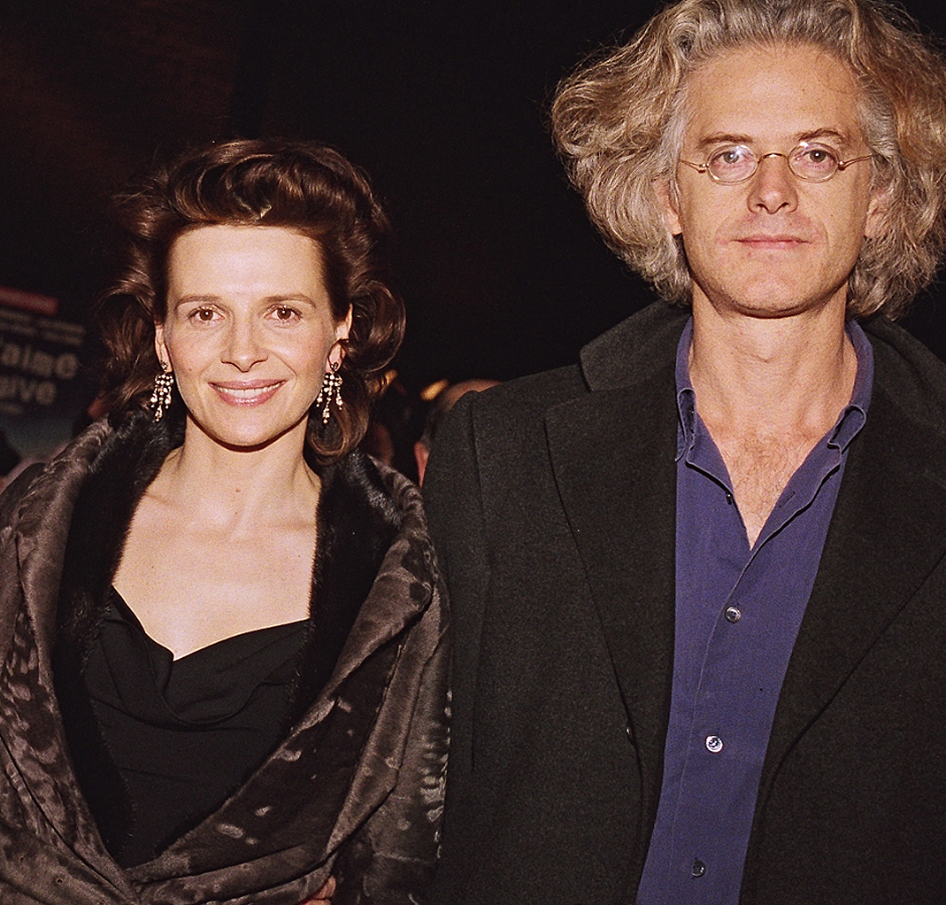 Juliette Binoche, invitée de Cinemania en 2006